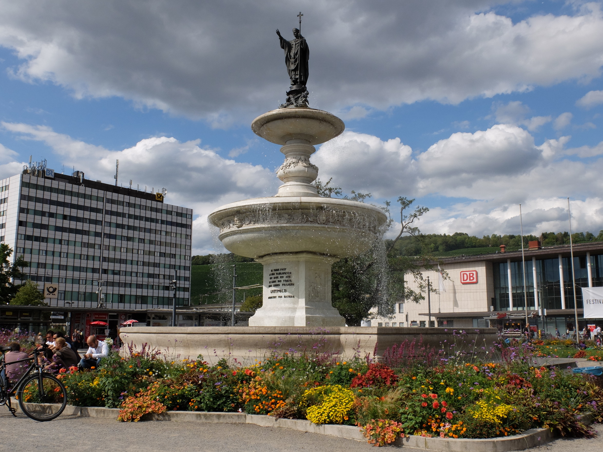 Kiliansbrunnen auf dem Bahnhofsvorplatz Würzburg HbfThis is a photograph of an architectural monument.